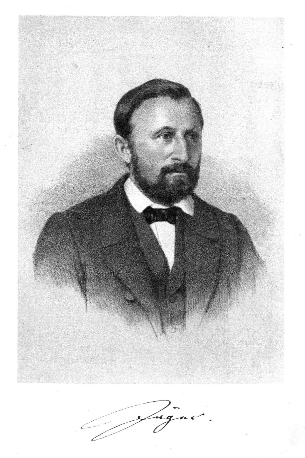 Hermann Jäger, Porträt mit Signatur